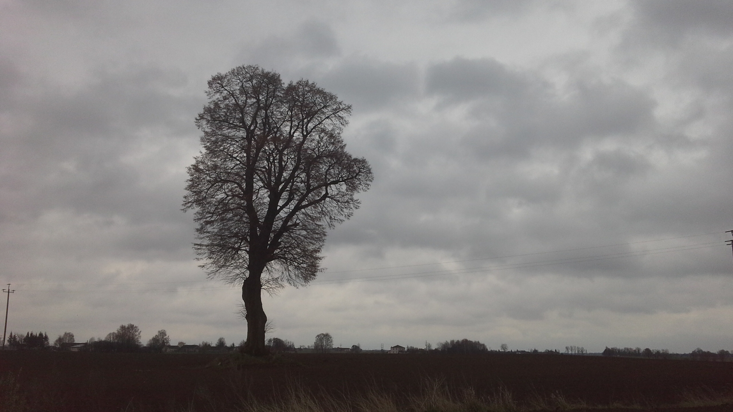 Miejsce, gdzie dawniej znajdowała się cerkiew św. Mikołaja w Szychowicach, rozebrana na początku lat 50. XX wieku